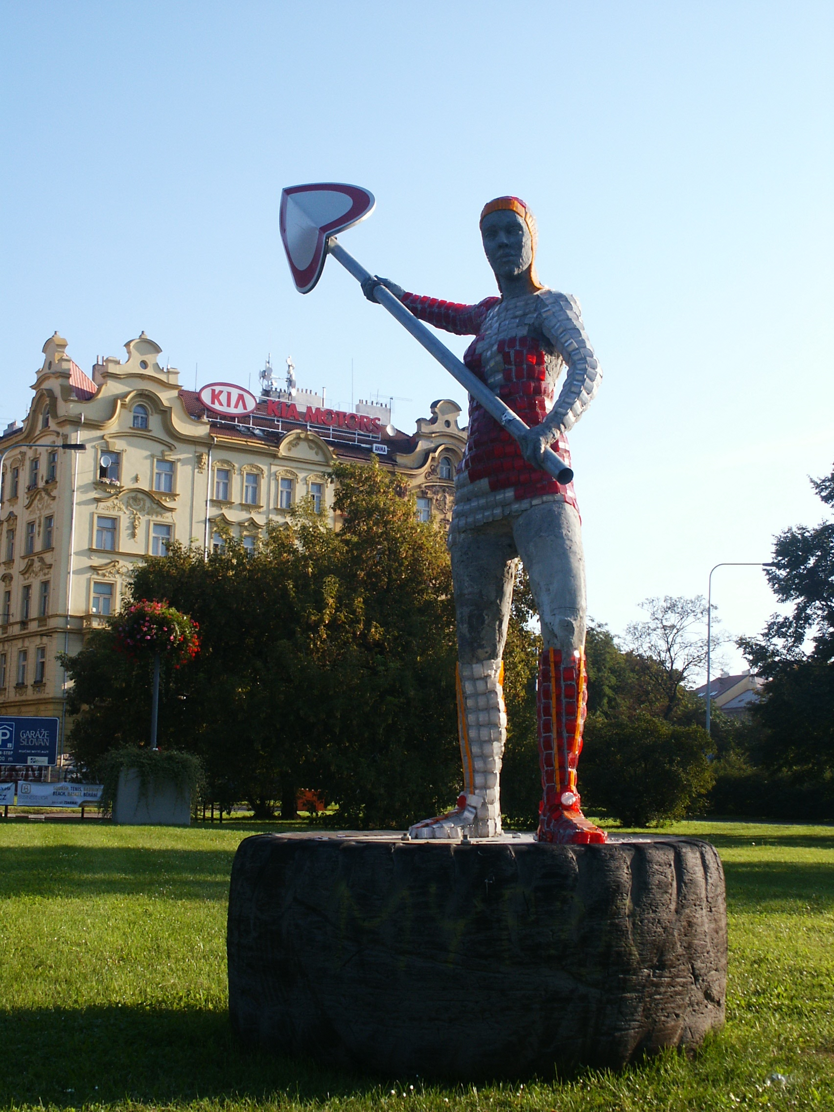 Praha - Nové Město, Bohyně 390 km v hodině (Jan Boháč)